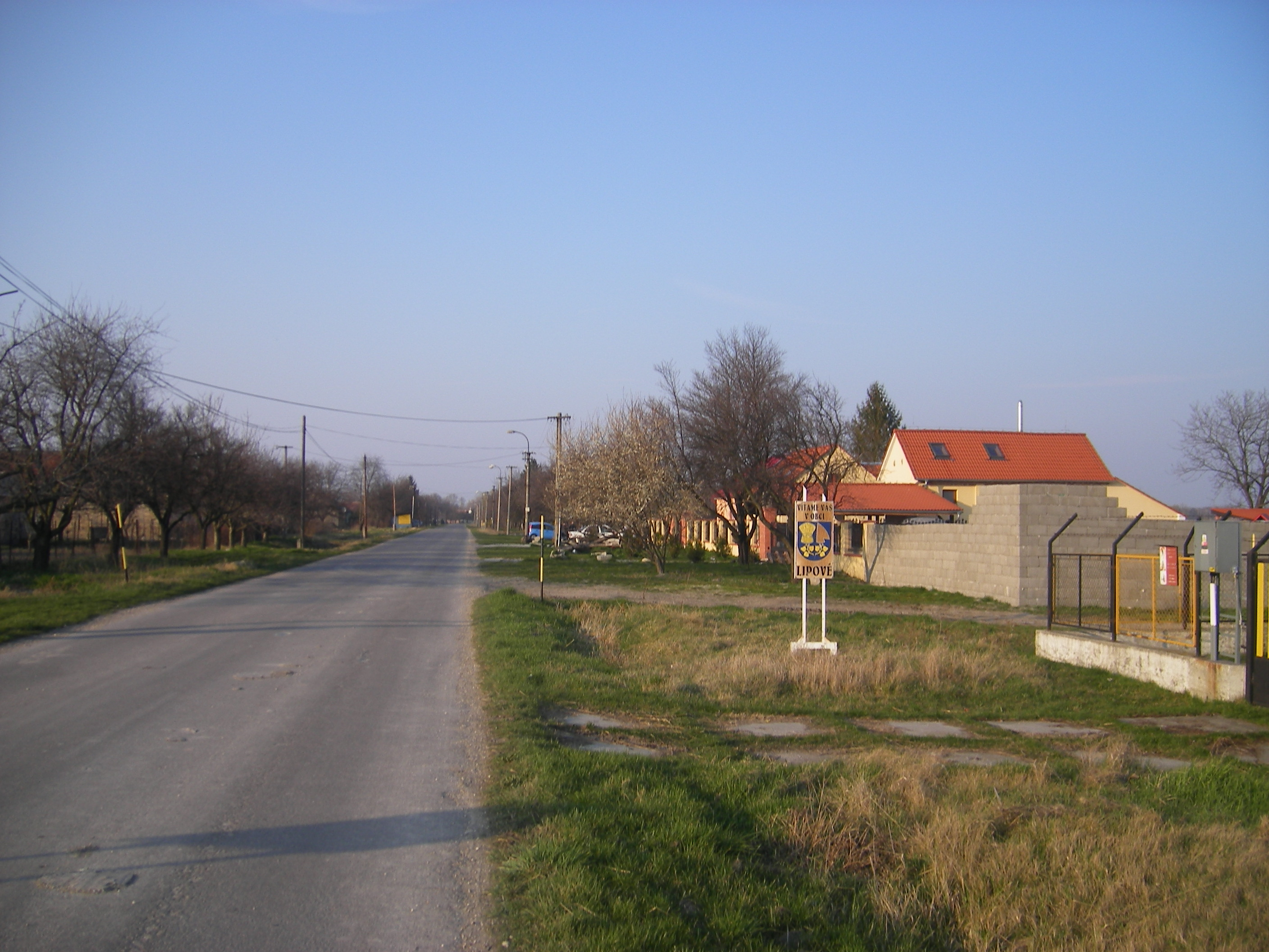 Zsemlékes